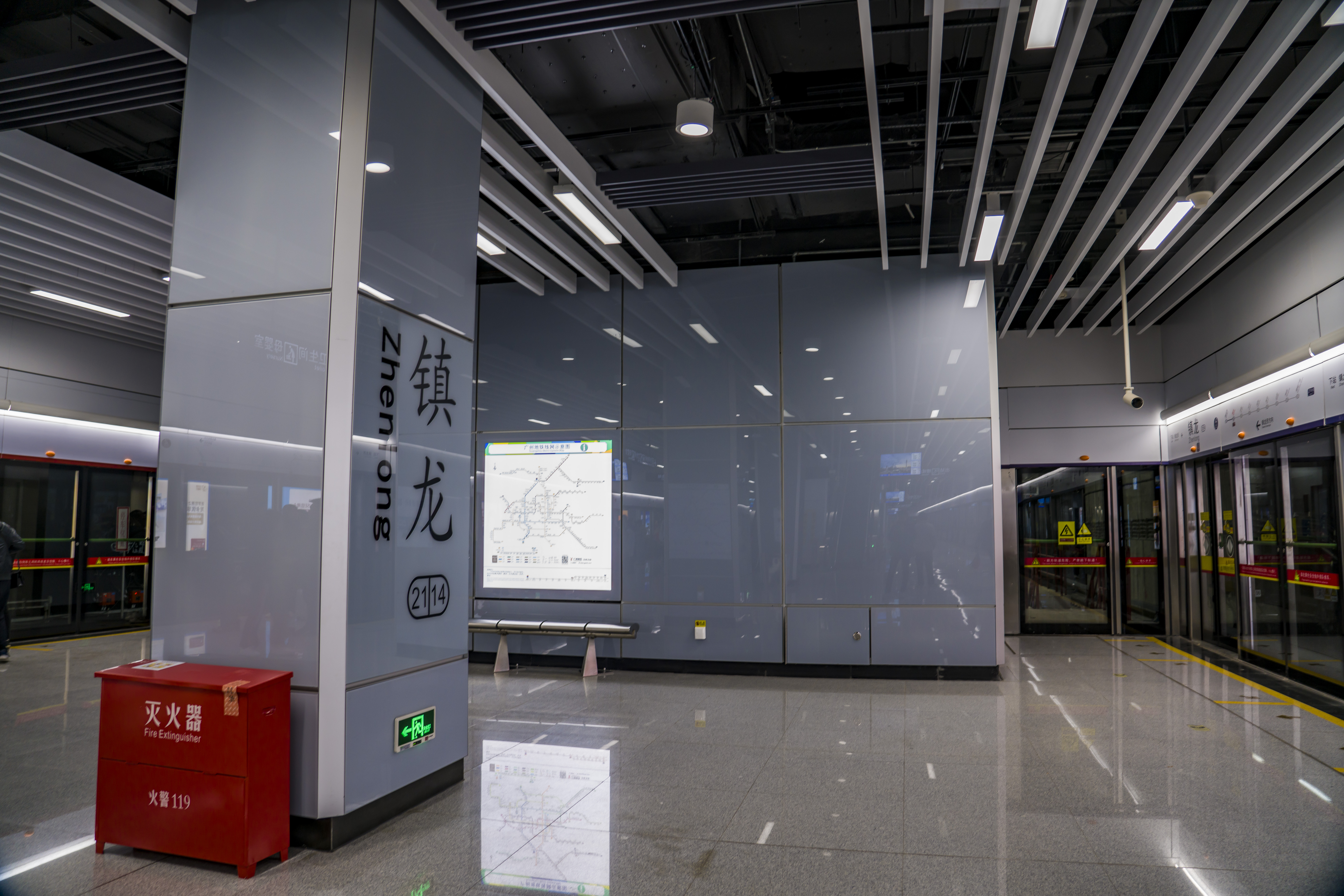 镇龙站月台